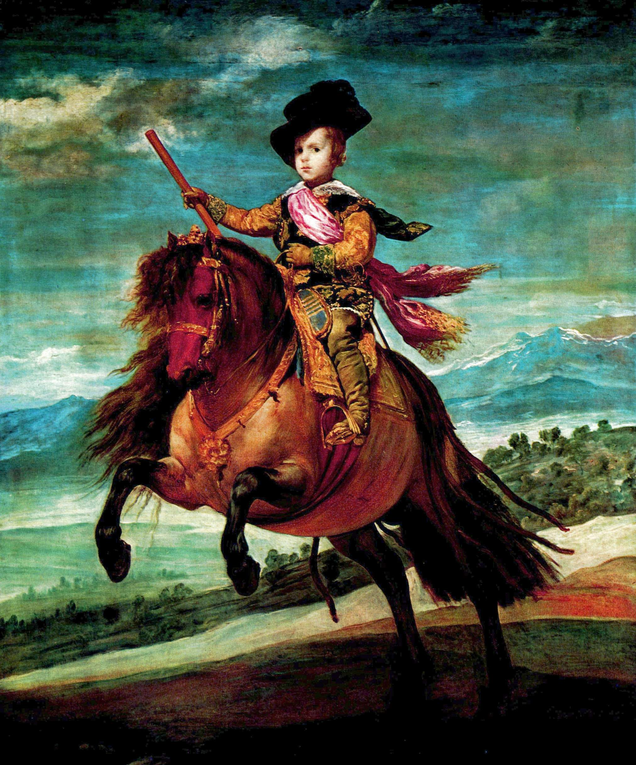 Retrato ecuestre del príncipe Baltasar Carlos de Austria (1629-1646), que fue hijo del rey Felipe IV de España y de la reina Isabel de Borbón.